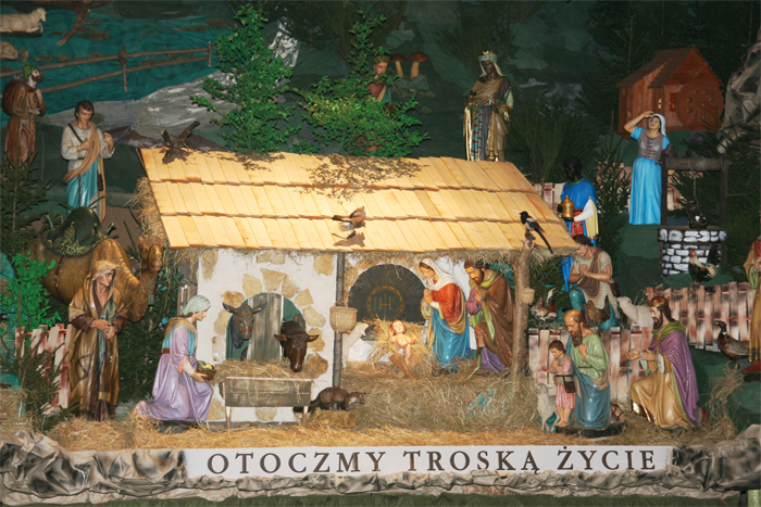 Crib in Katowice Panewniki, Poland (2008)